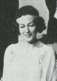 Skådespelare från den svenska långfilmen "För att inte tala om alla dessa kvinnor". Barbro Hiort af Ornäs.